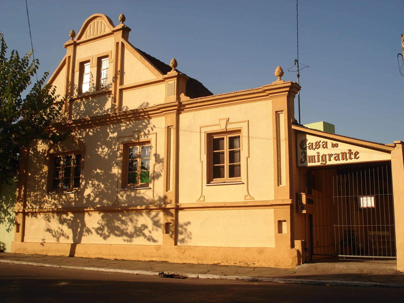 Casa do Imigrante / Museu Professor Gustavo Adolfo Koetz em Igrejinha